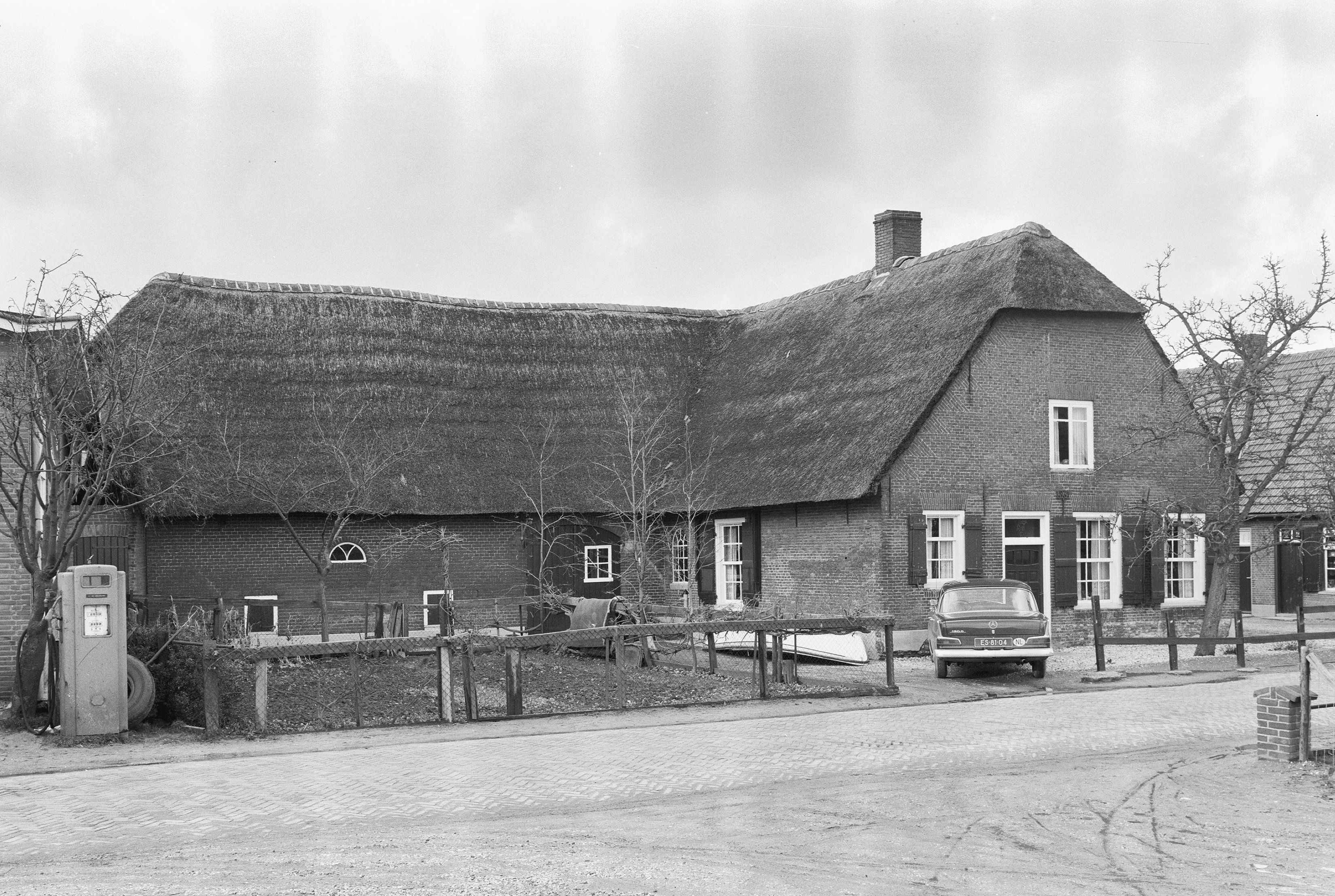 aanzicht